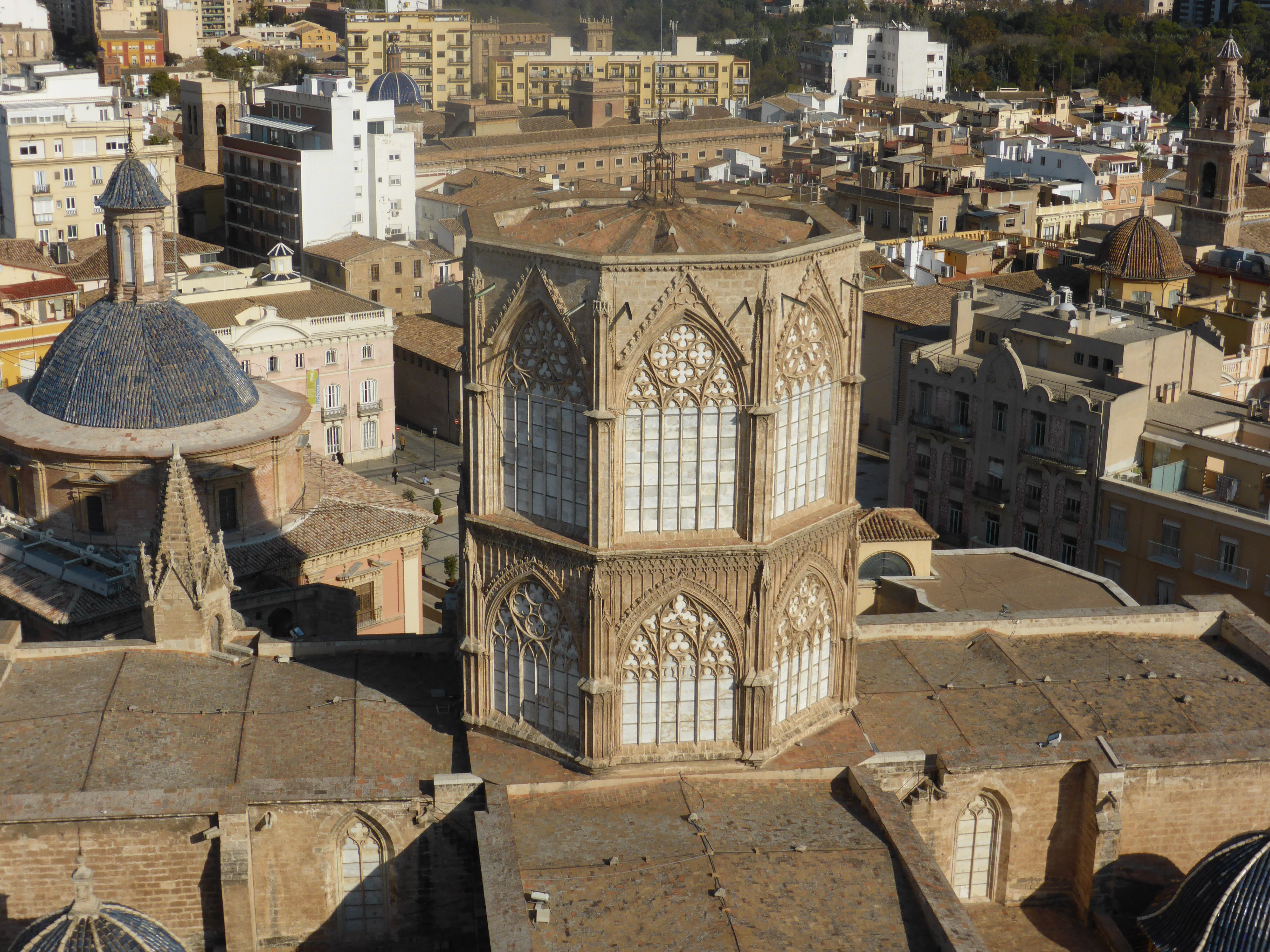 Cimborrio octogonal, gótico, de dos cuerpos superpuestos, con ocho vidrieras de fina tracería calada en cada cuerpo. La parte baja es del siglo XIV, mientras que el segundo cuerpo, o parte alta, fue obra de Martí Llobet (hacia el año1430, en el siglo XV). Este cimborrio da luz natural blanca al crucero, gracias a las ventanas translúcidas de alabastro y a que su armazón de piedra está reducido al mínimo. Esta fotografía está obtenida desde la terraza de la torre del Miguelete o Micalet, de la propia catedral de Valencia. A la izquierda, se ve también la gran cúpula de tejas azuladas de la cercana Basílica de la Virgen de los Desamparados.